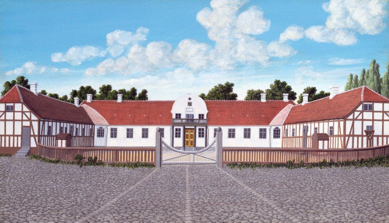 Østruplund, gouache af Niels Ringe (1791-1854)